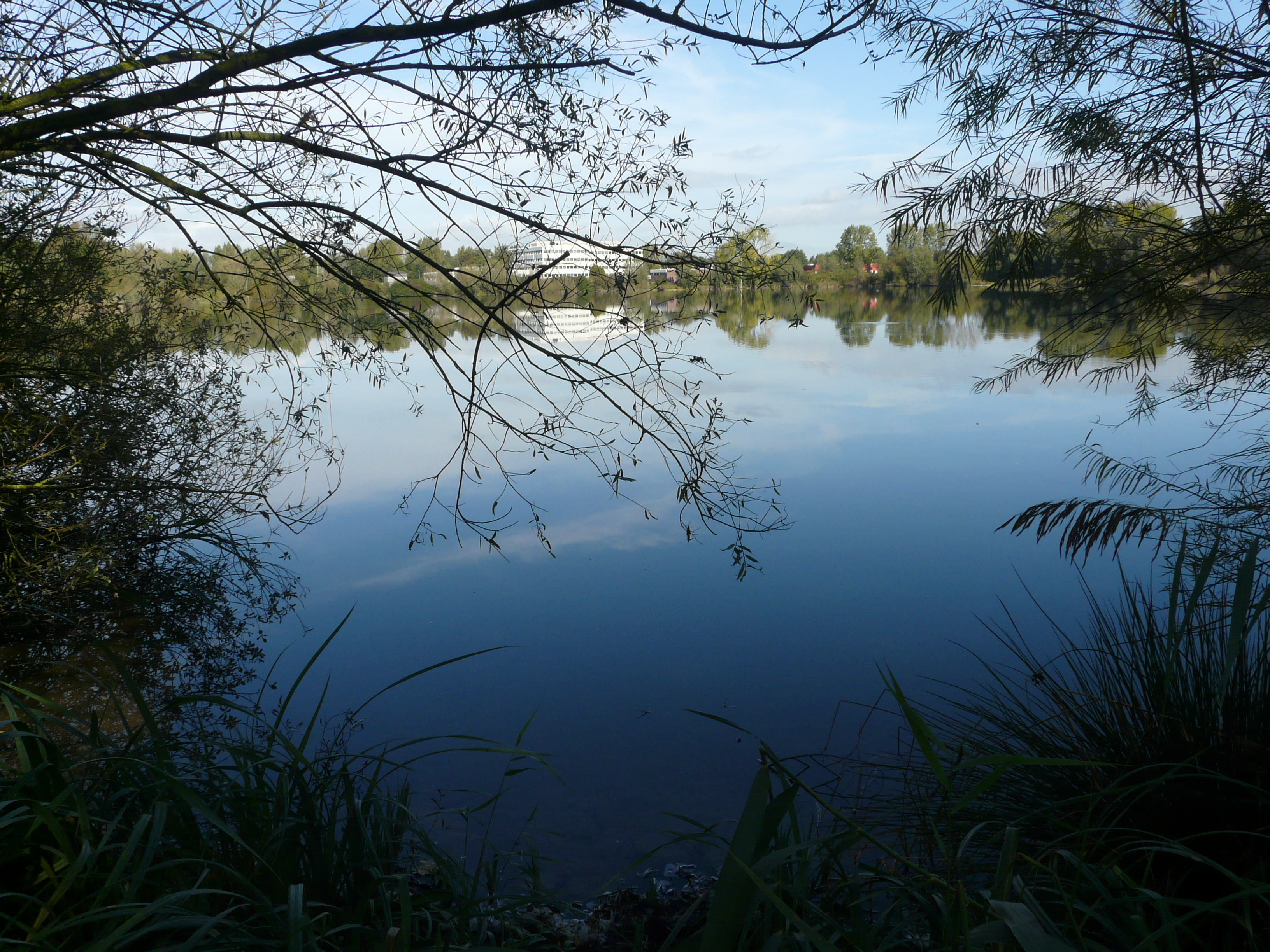 Emerput is een plas langs de Emerparklaan gelegen nabij de wijk Gageldonk in het grote stadsdeel de Haagse Beemden in het noordwesten van Breda